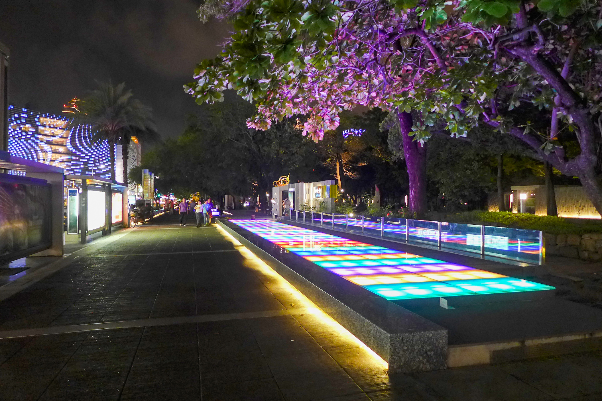 Kaohsiung Urban Spotlight